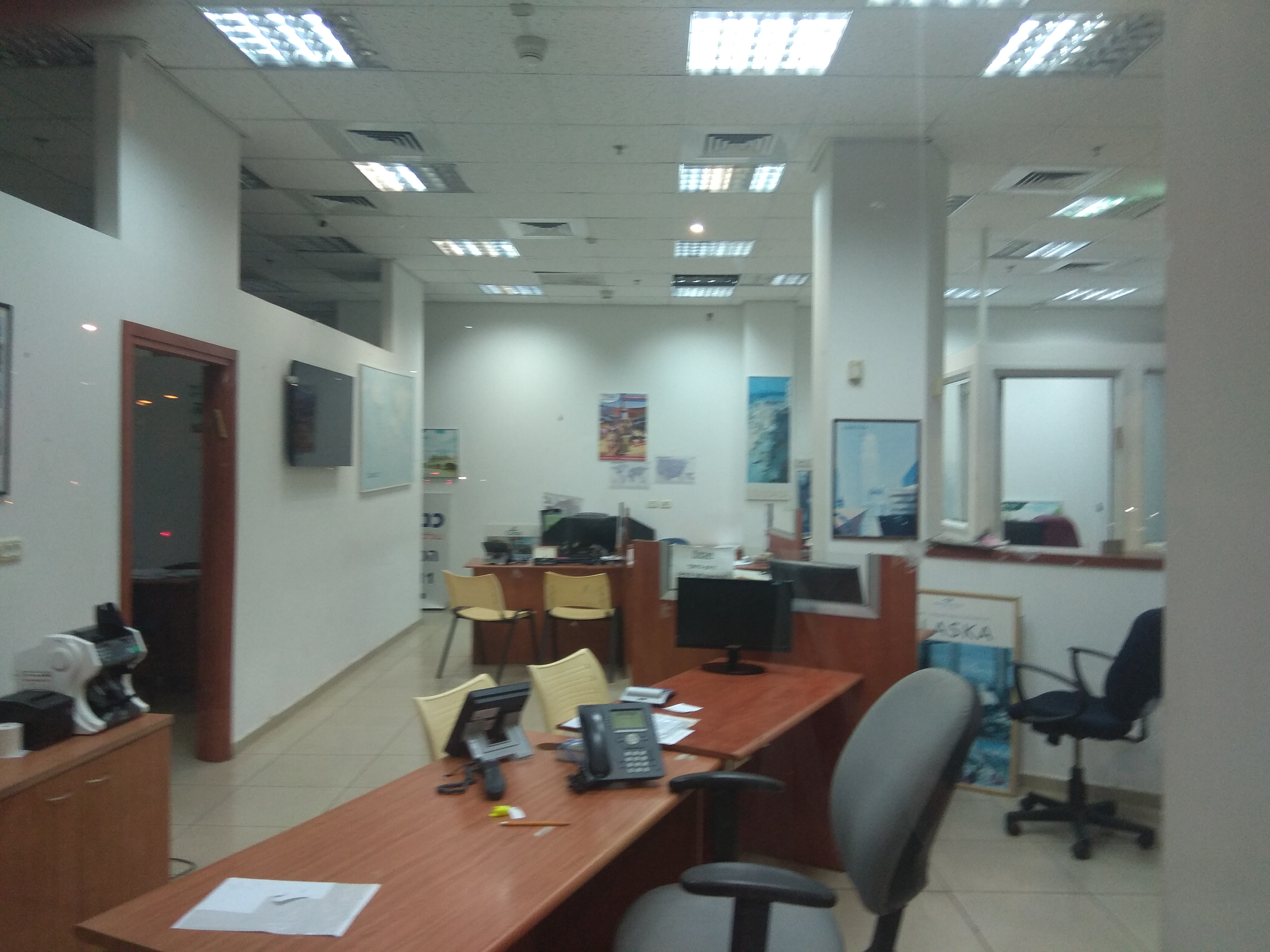 משרד נסיעות כנפי משק